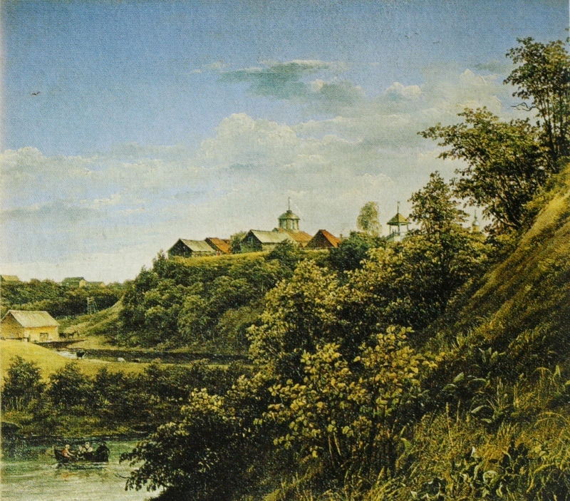 Лебедев Михаил «Васильково. Имение инспектора Академии Художеств А.И.Крутова» 1833 Холст, масло 40х45,2 Государственная Третьяковская галерея